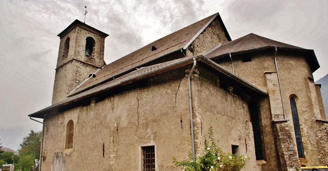 église St Christophe